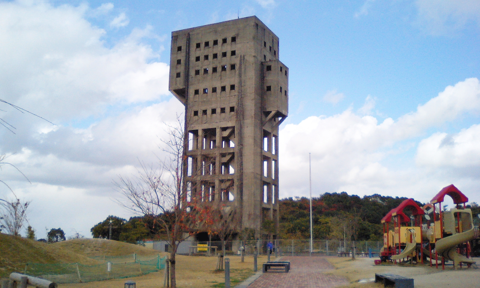 志免炭鉱竪坑櫓